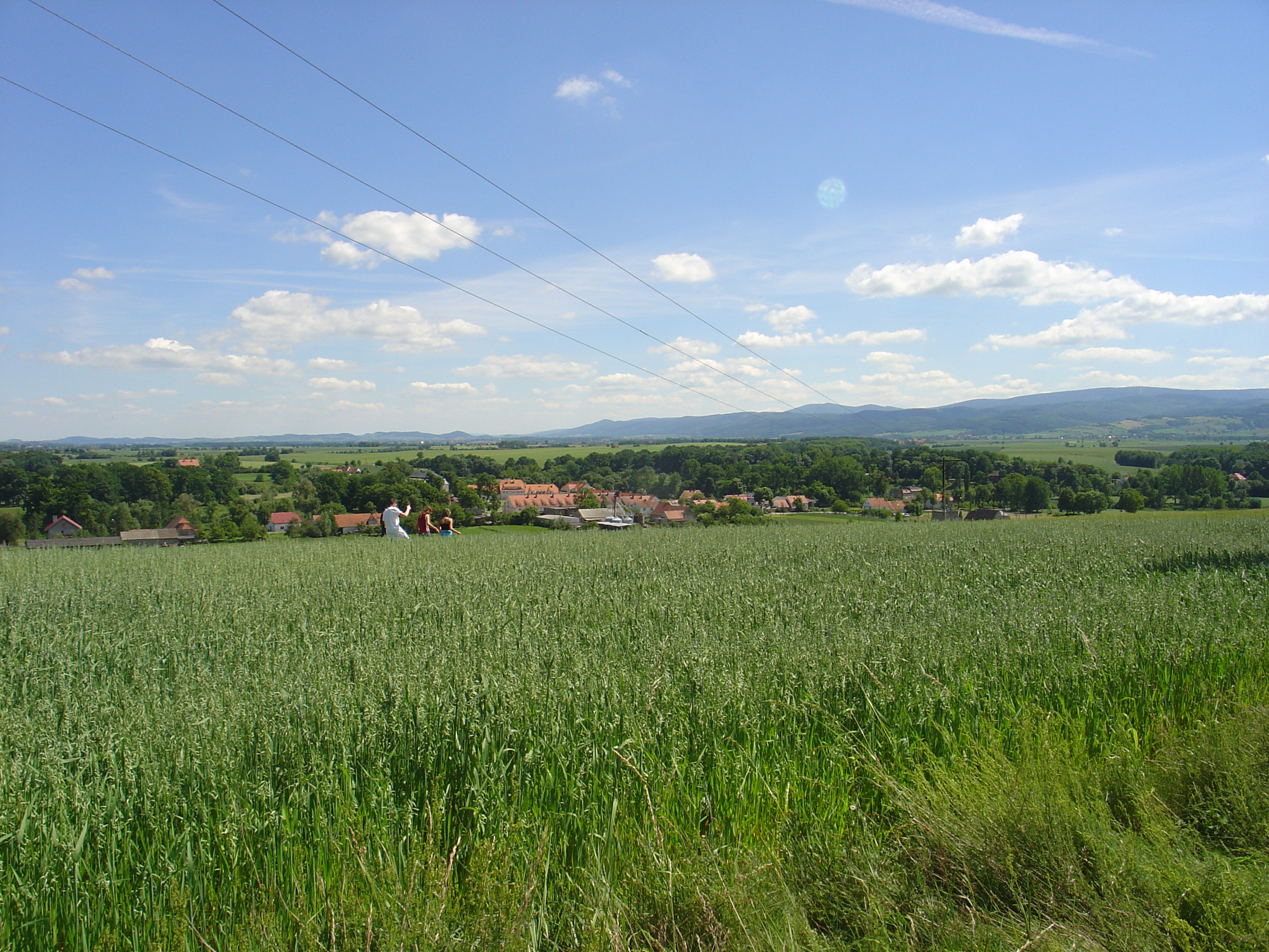 Panorama vom Kapellenberg aus über das Dorf Krzyżowa (Kreisau).